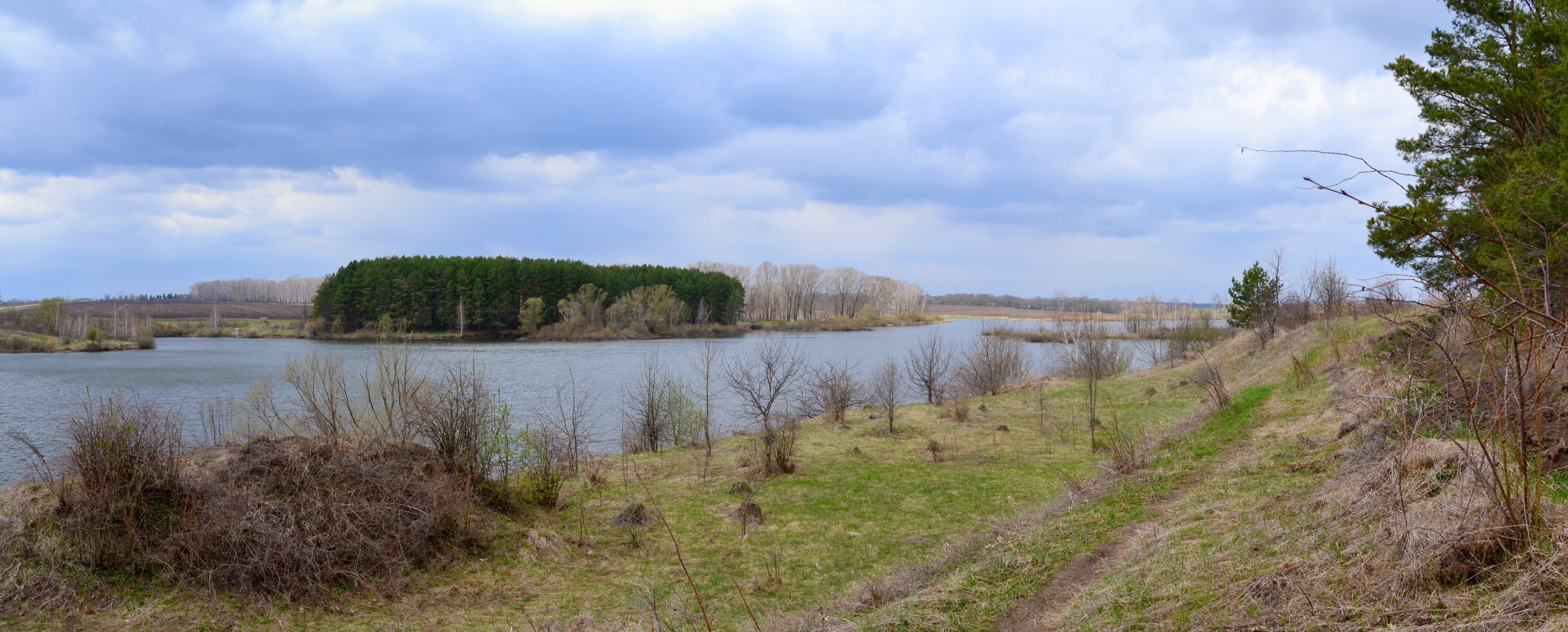 Тербунские песчаники: Вторые Тербуны, Тербунский район, Липецкая область This image is related to the protected area of Russia number 4810138